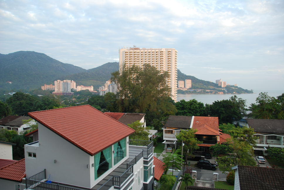 Taman Tanjung Bunga, Tanjung Bungah, Pulau Pinang, Malaysia